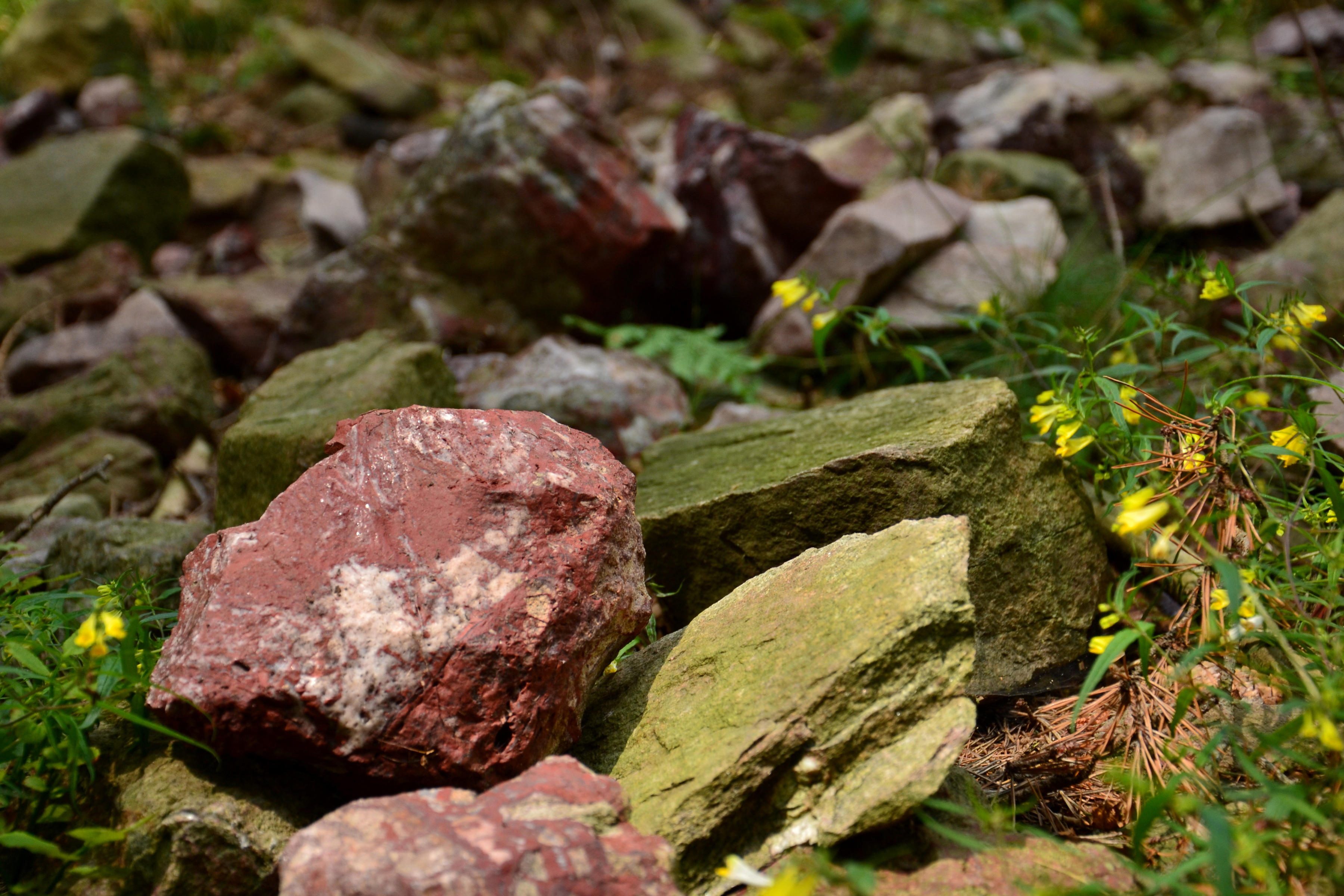 Jaspis